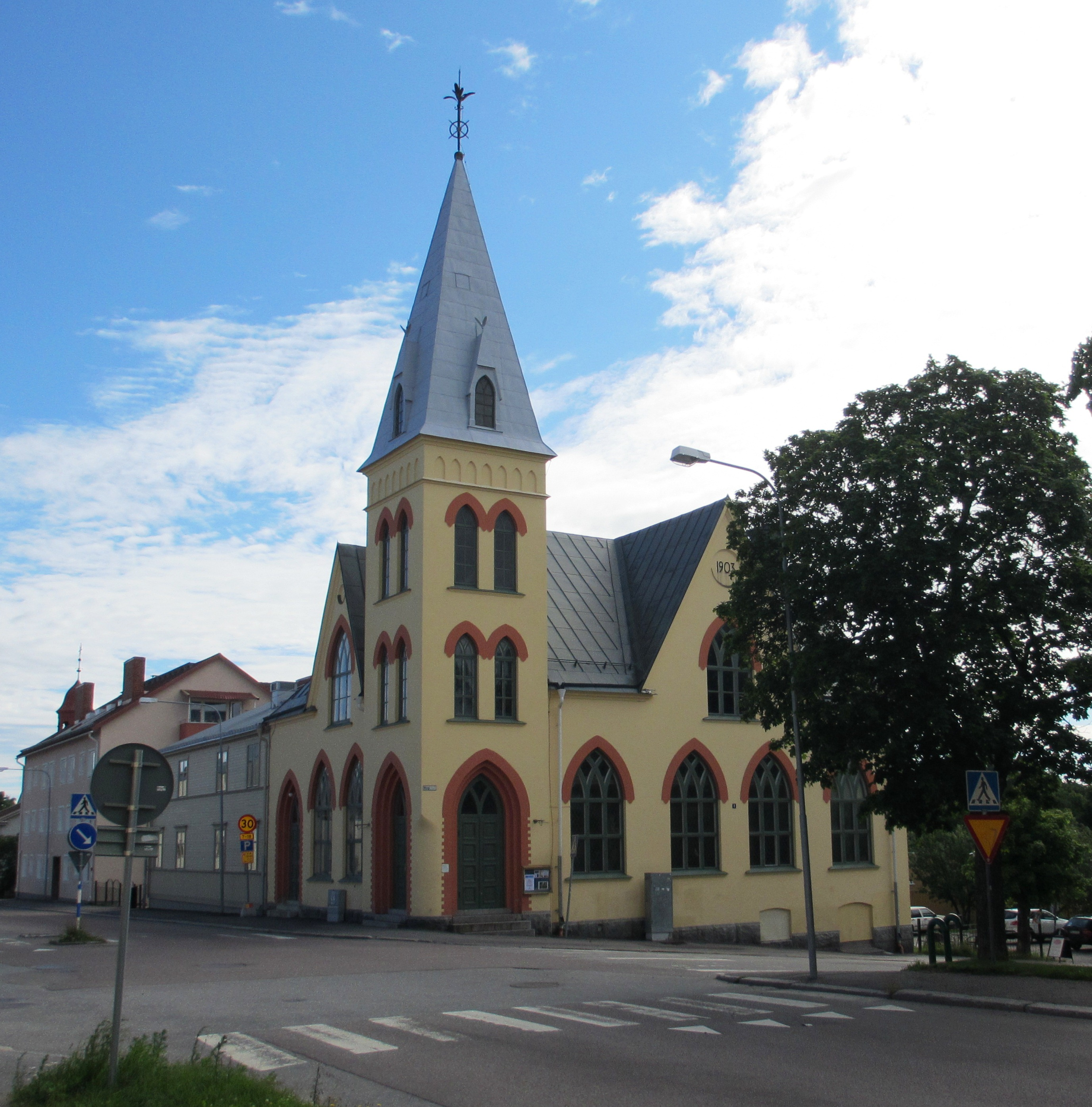 Baptistkyrkan i Söderhamn